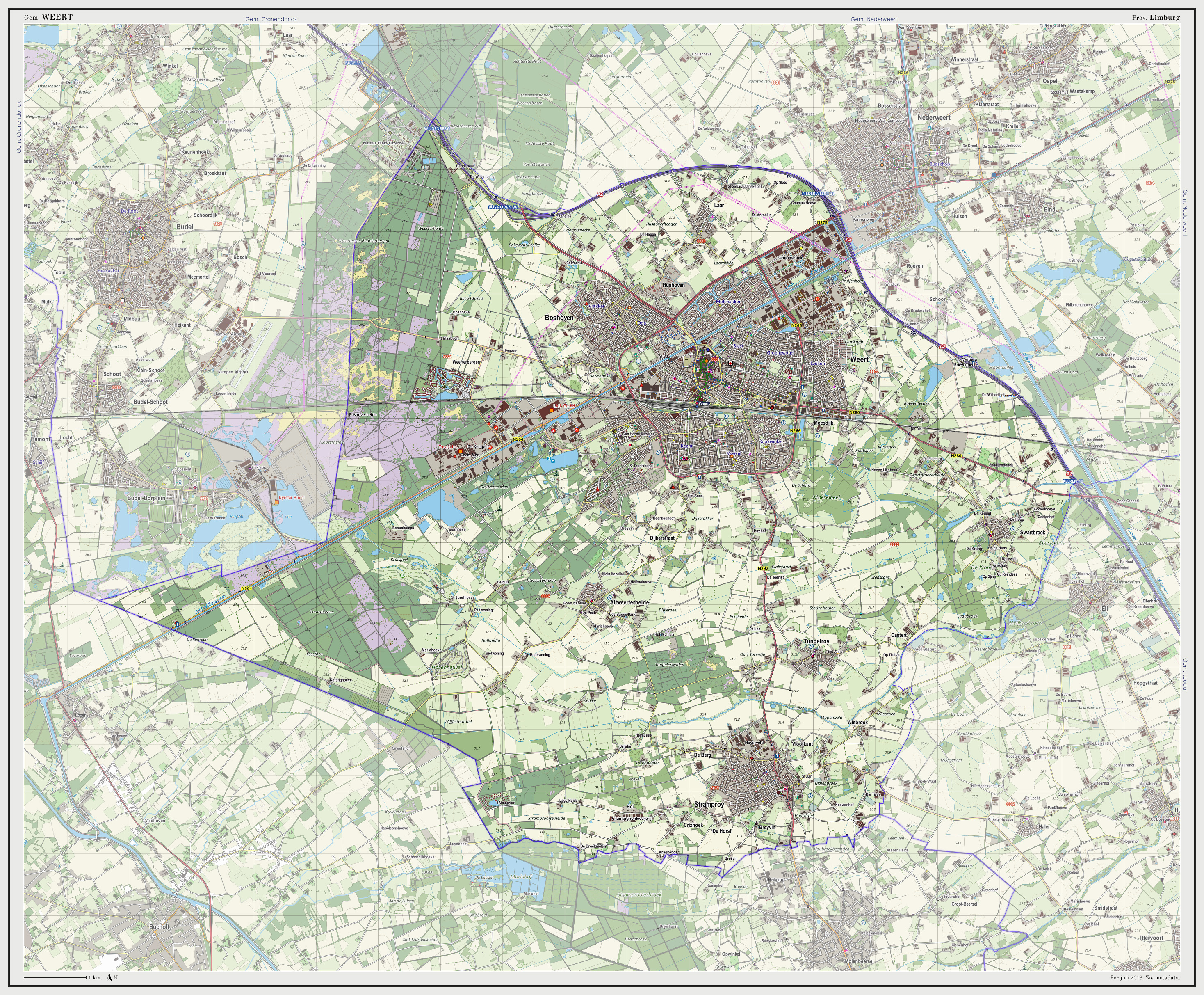 Topografische kaart van gemeente Weert (2013). Samengesteld door Jan-Willem van Aalst op basis van de GML open geodata van de BRT/Top10NL (basisregistratie Topografie, Kadaster 2011), vrijgegeven door Kadaster onder de Creative Commons BY licentie. Additionele gegevens uit BAG (8 juli 2013), uit de Open Street Map (9 juli 2013) en uit de Risicokaart. Peildatum kaartbeeld: 9 juli 2013. Zie ook Gemeentenatlas.nl Samenstelling en kleurenschema: Jan-Willem van Aalst, met QuantumGIS en Photoshop. Zie ook de Legenda.